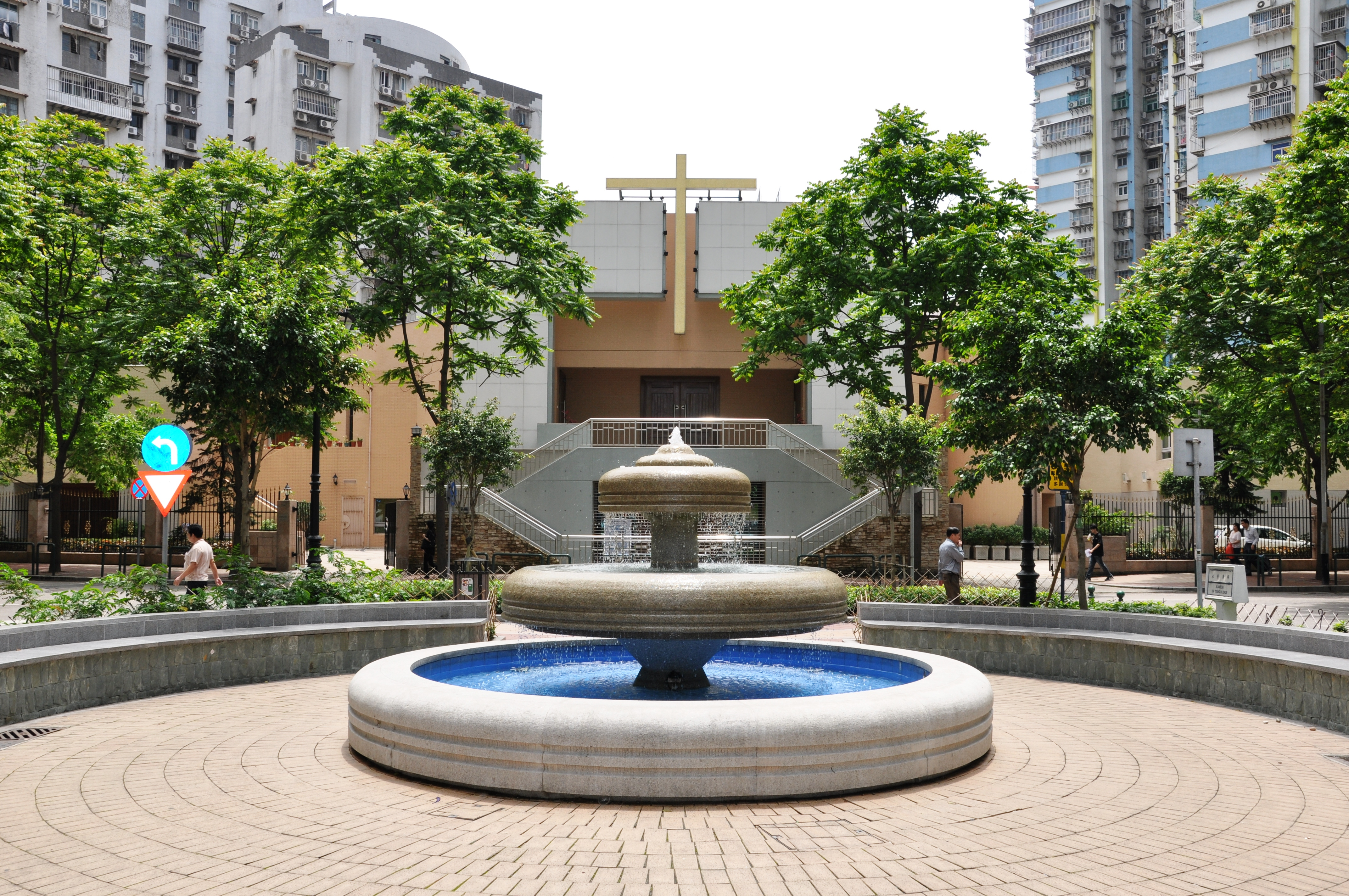 Igreja De S. José Operário, Macau